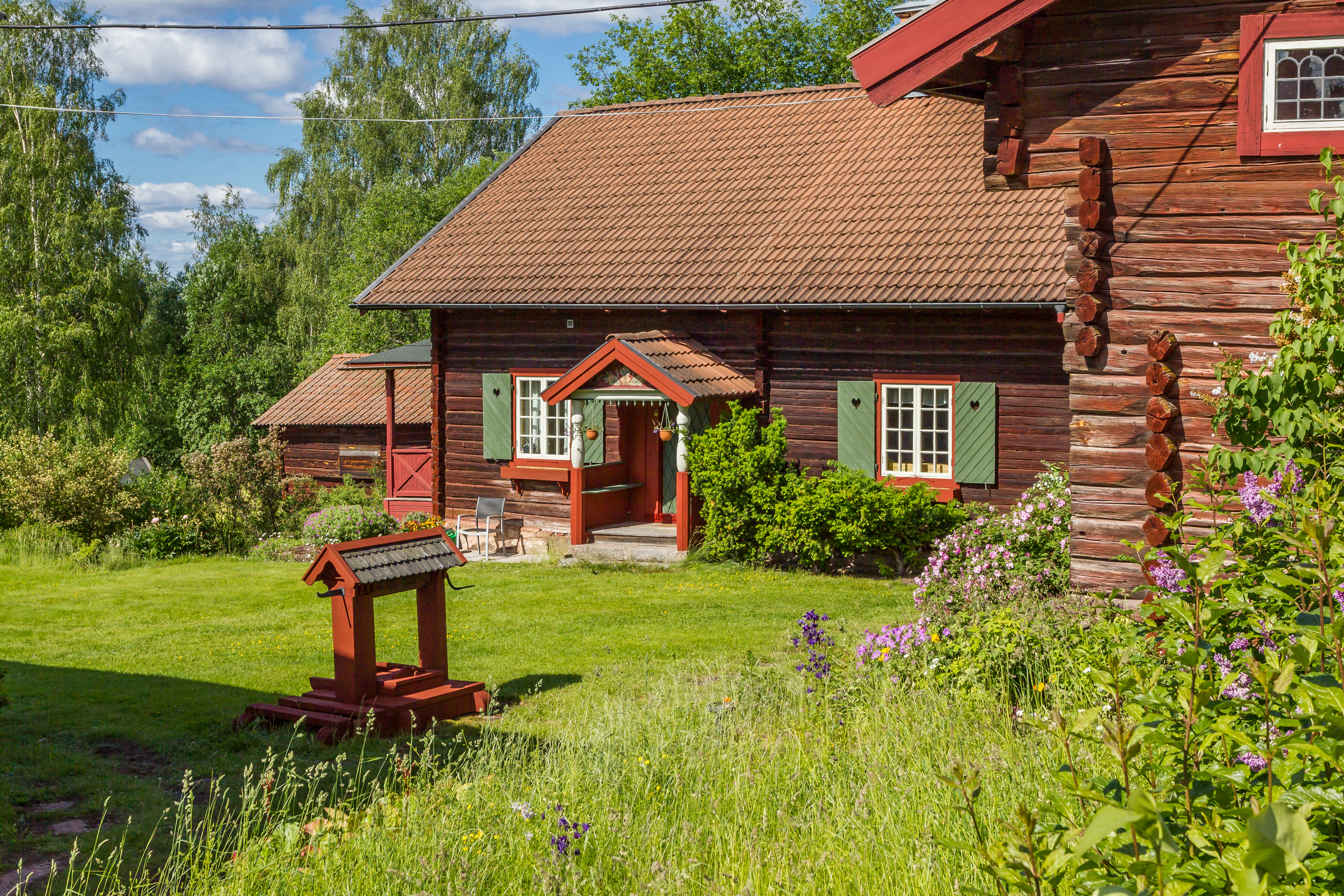 Tånggården i Sjurberg, Rättviks kommun, Sverige.